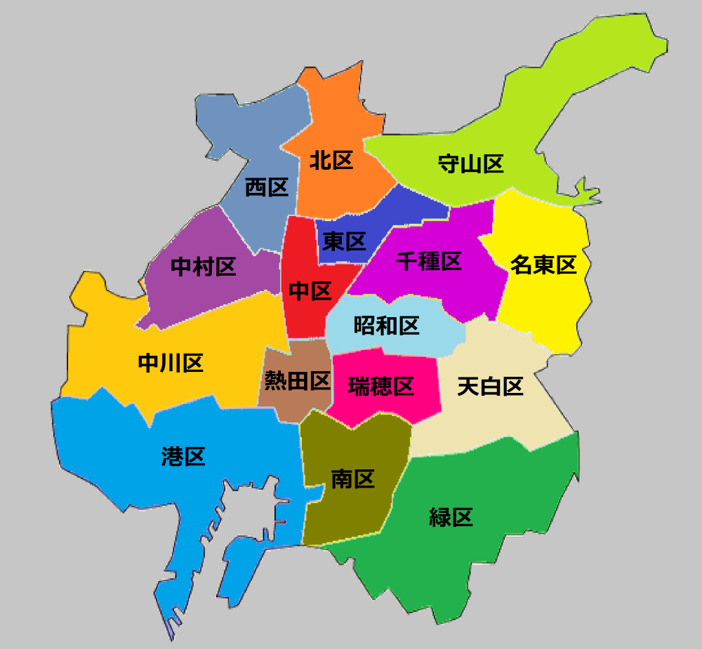 名古屋市16区